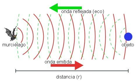 Esquema de la ecolocación en los murciélagos